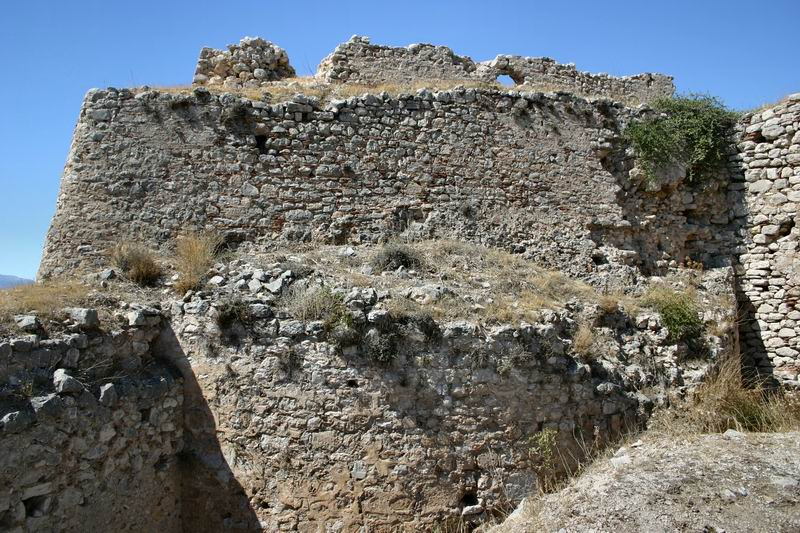 Burg Argos